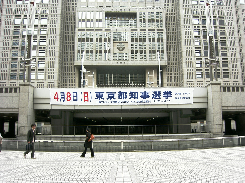 TokyoTocho_Shinjuku Tokyo Japan